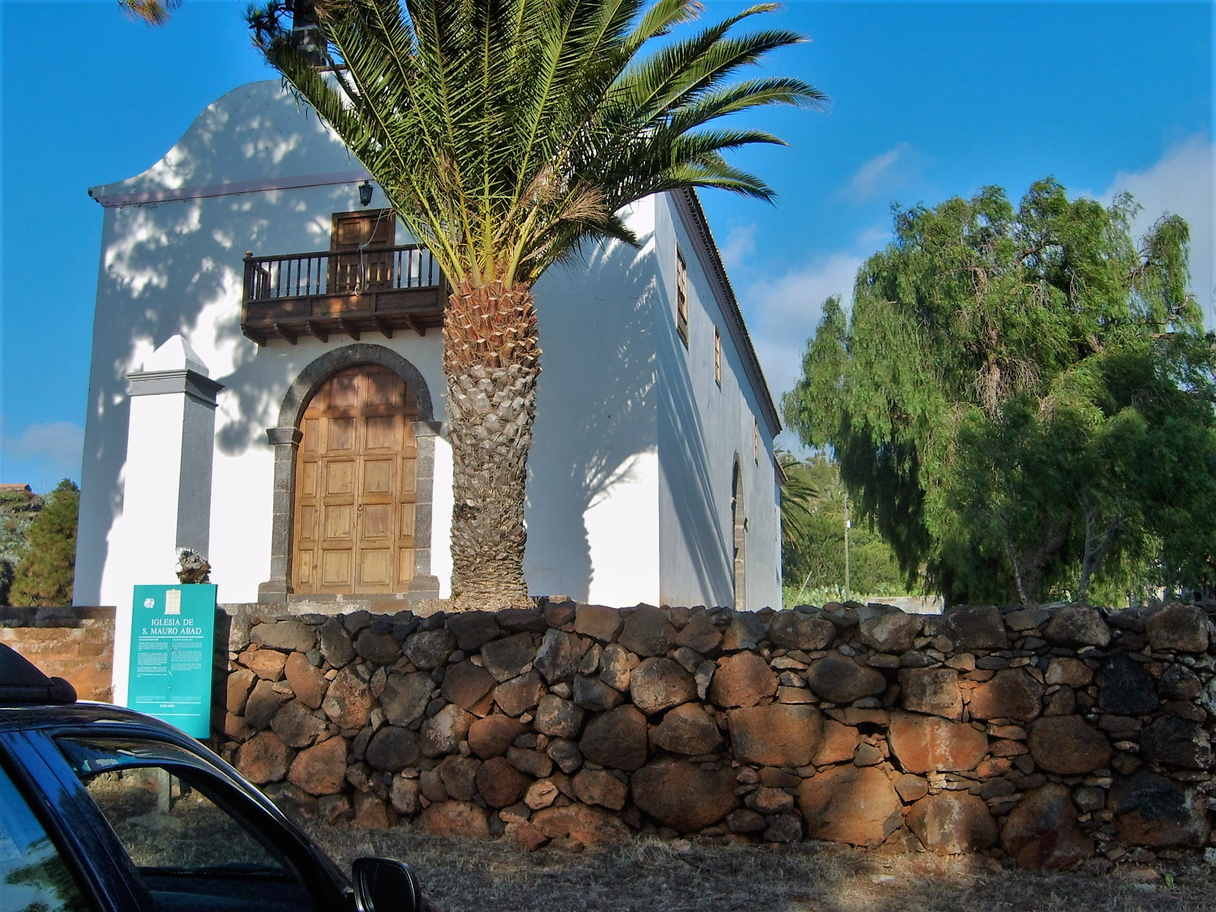 Ermita de San Mauro - PuntaGorda - La Palma